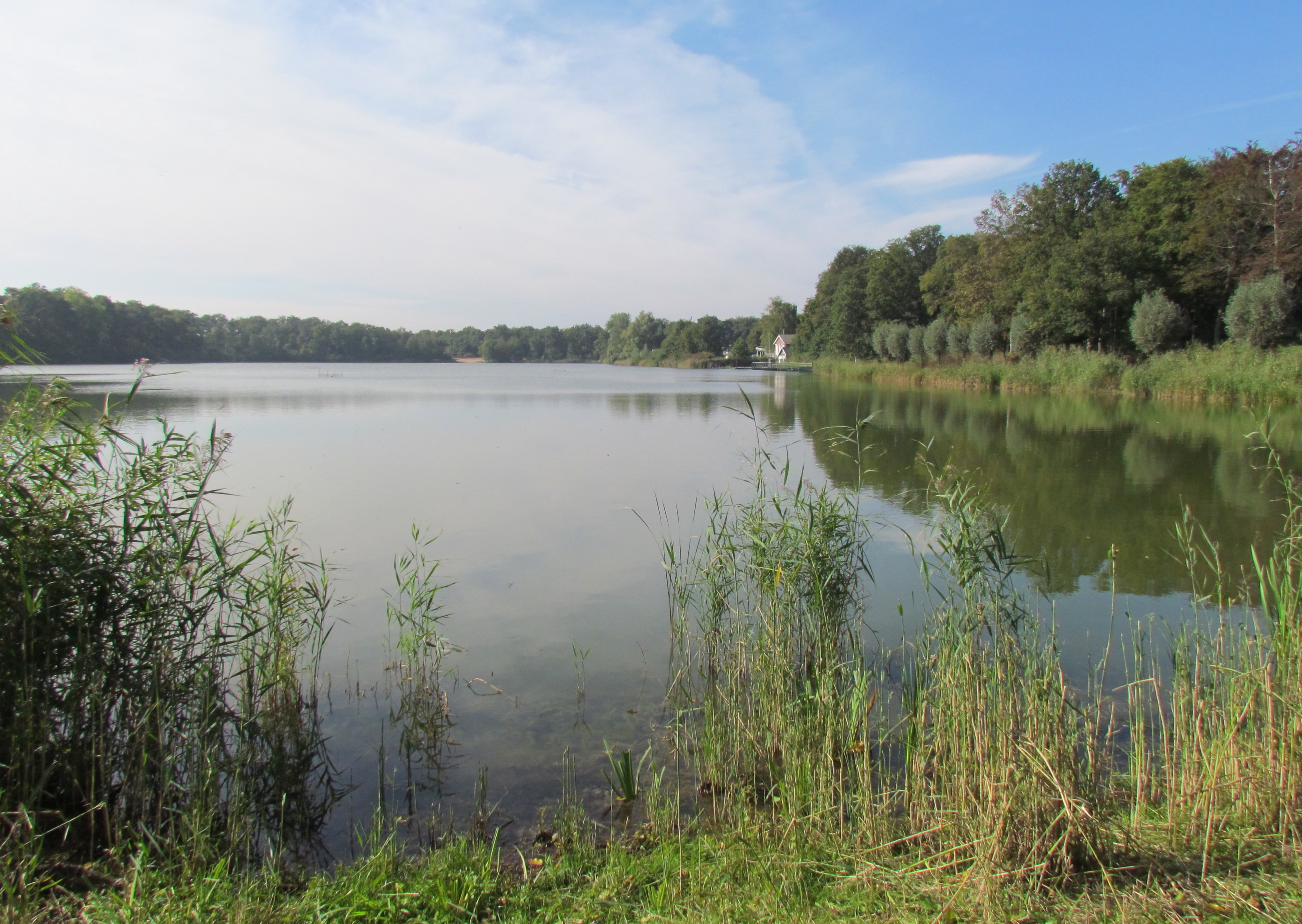 De IJzeren Man, recreatiegebied bij Weert (NL). De plas is ontstaan door zandafgraving